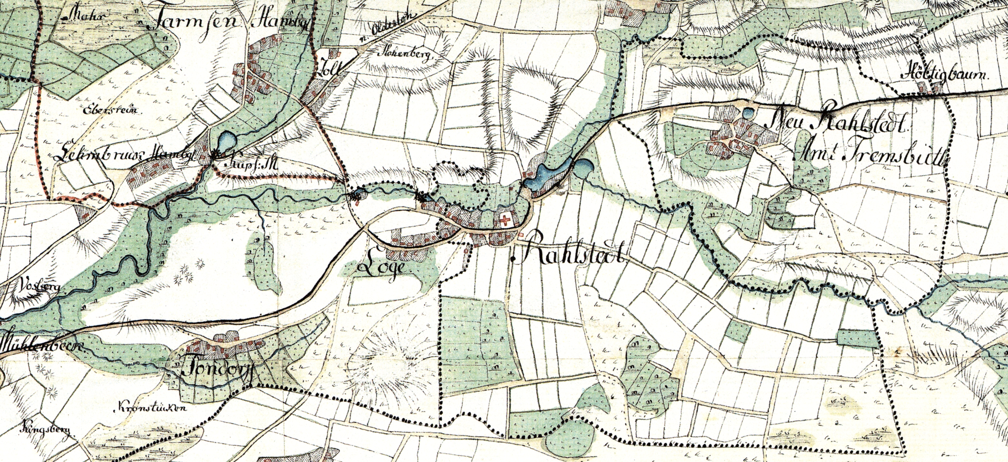 Ausschnitt Rahlstedt aus Image:Varendorf(63)Bergedorf Reinbek.jpg. Aufgenommen in den Jahren 1789 bis 1796 unter der Direktion des Majors Gustav Adolf von Varendorf durch Offiziere des Schleswigschen Infanterieregiments